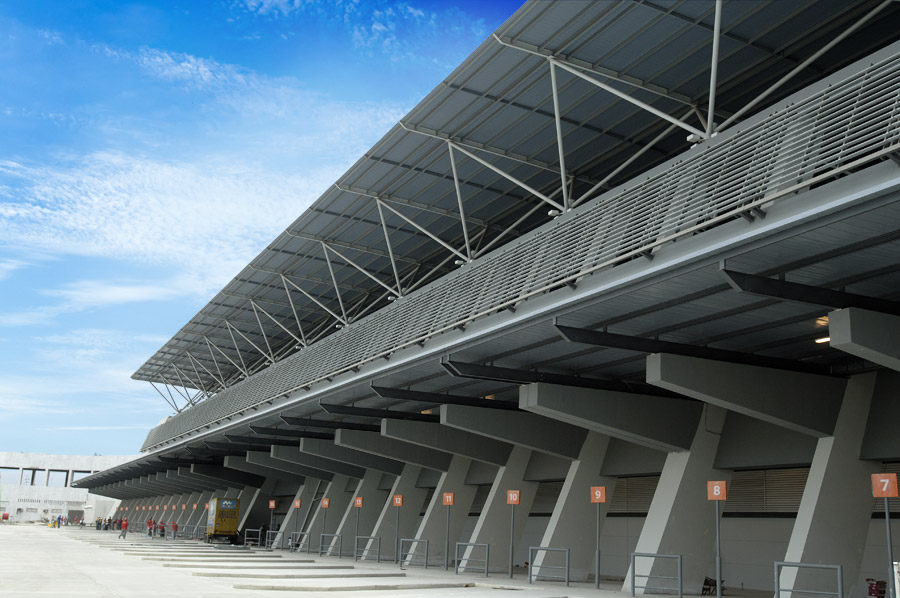 Andenes del Nuevo Terminal Terrestre de Guayaquil